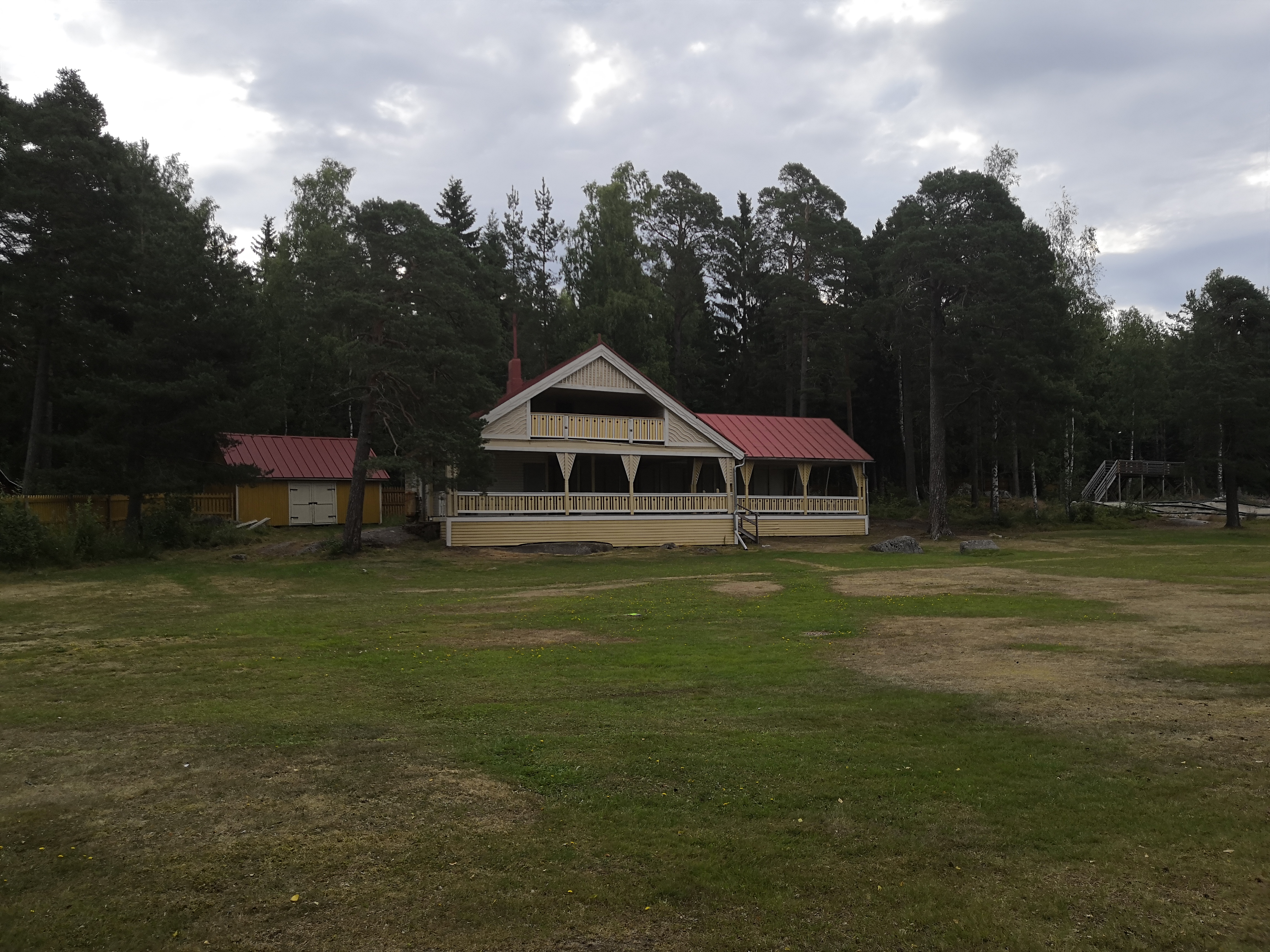 Vuonna 1890 vapaapalokunta rakensi kittholman kaupunginosaan Pietarsaareen juhla-alueen, jossa on sittemmin järjestetty monenlaisia tapahtumia kesäisin.